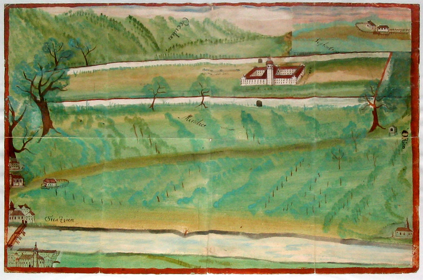 Aquarellierte Skizze für den Neubau des Klosters St. Georgenberg auf der 'Eggen', gestaltet von Abt Benedikt III. Herschl, 1647. Das Projekt konnte nicht verwirklicht werden.